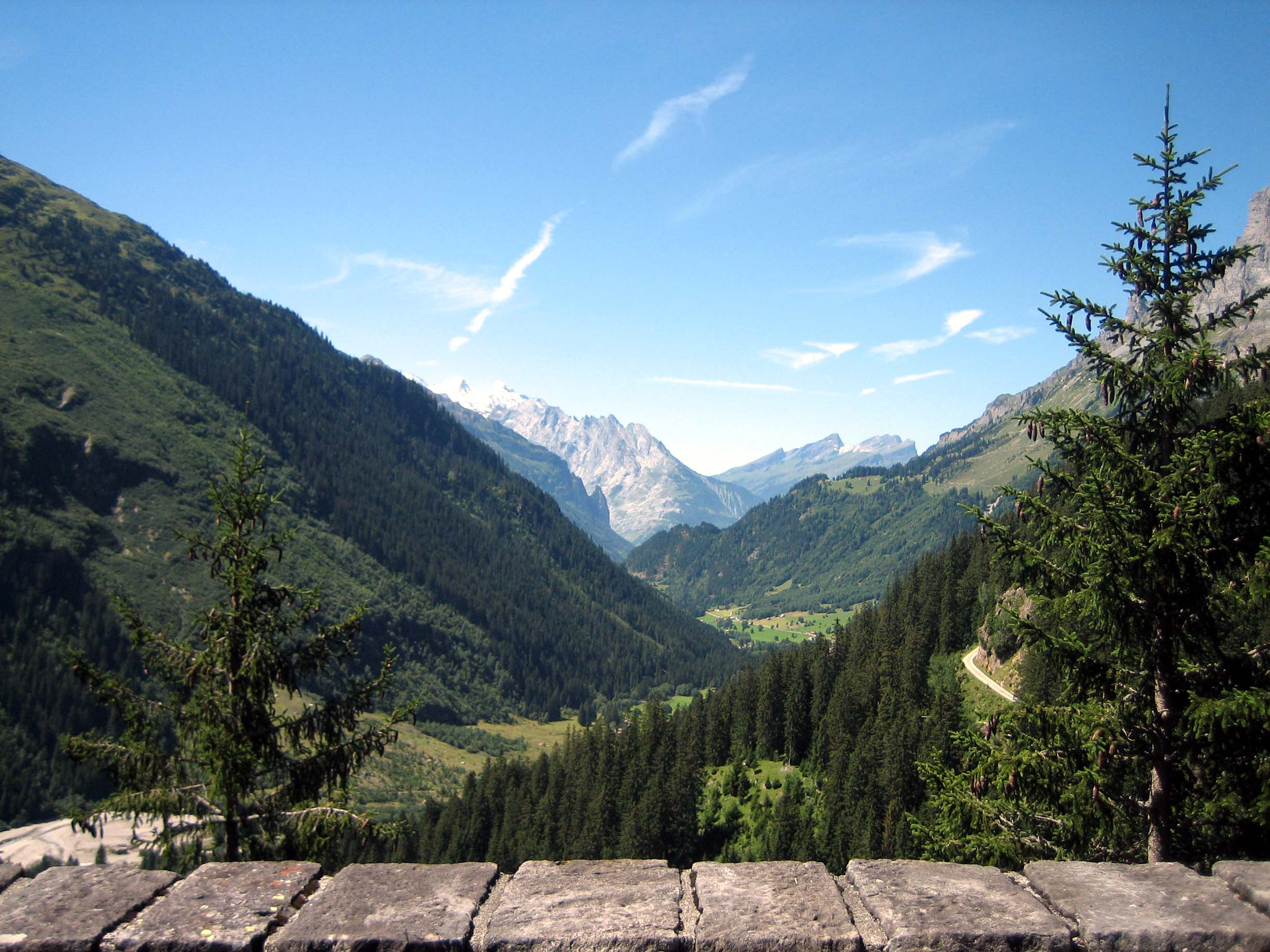 Gadmental talwärts